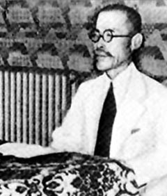 朴宪永